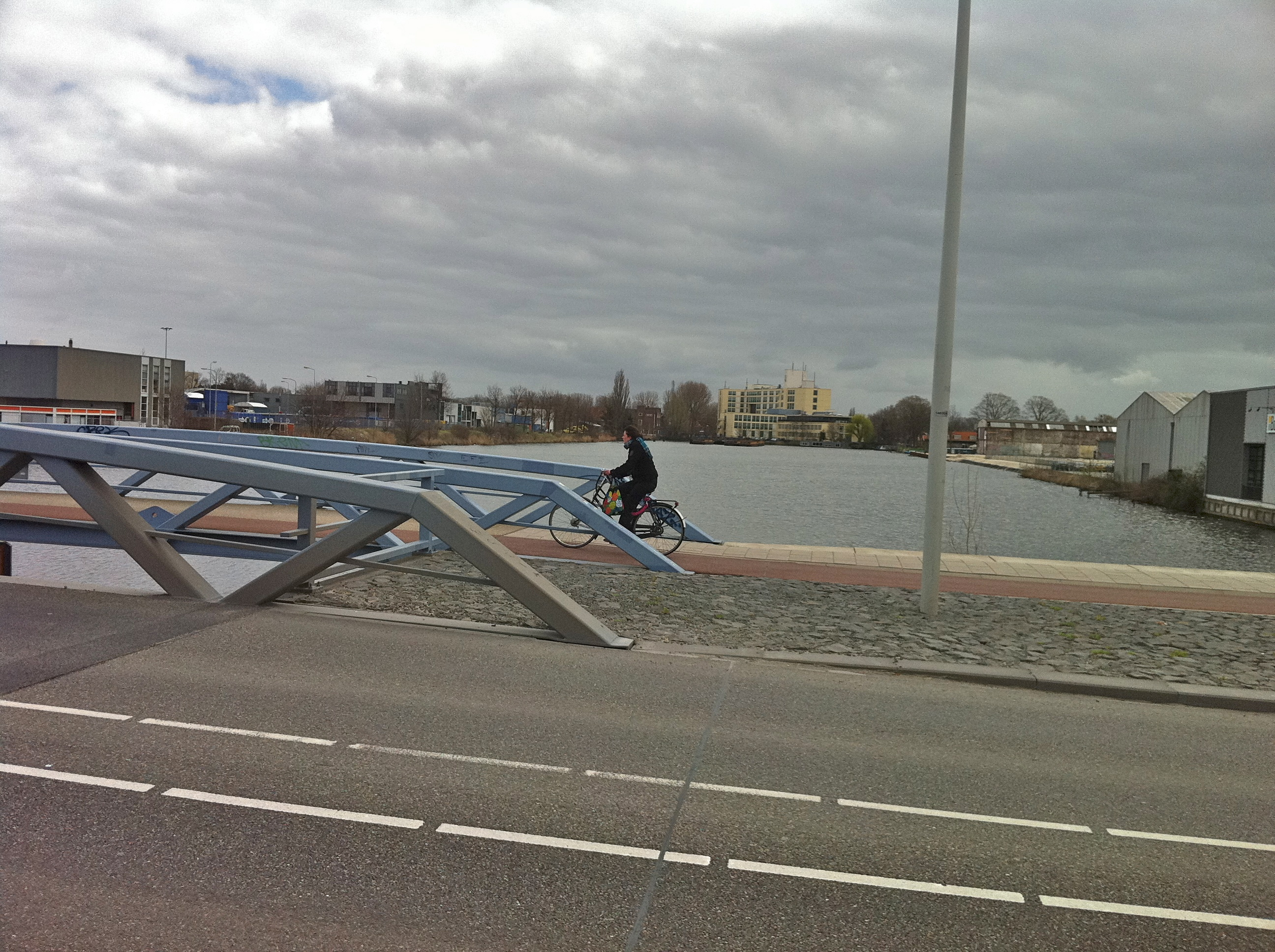 Amsterdam - Johan van Hasseltkanaal. NH Galxy op achtergrond. brug naar een ontwerp van Benthem Crouwel Architekten, maar bezuinigingen op het project hebben geleid tot een flinke versobering van de uiteindelijk aangelegde brug in de nieuwe Ridderspoorweg. De brug werd in 2009 opengesteld. De brug heeft geen beweegbaar gedeelte, maar het middendeel kan eruit getakeld worden ten behoeve van onder meer het transport van woonboten.